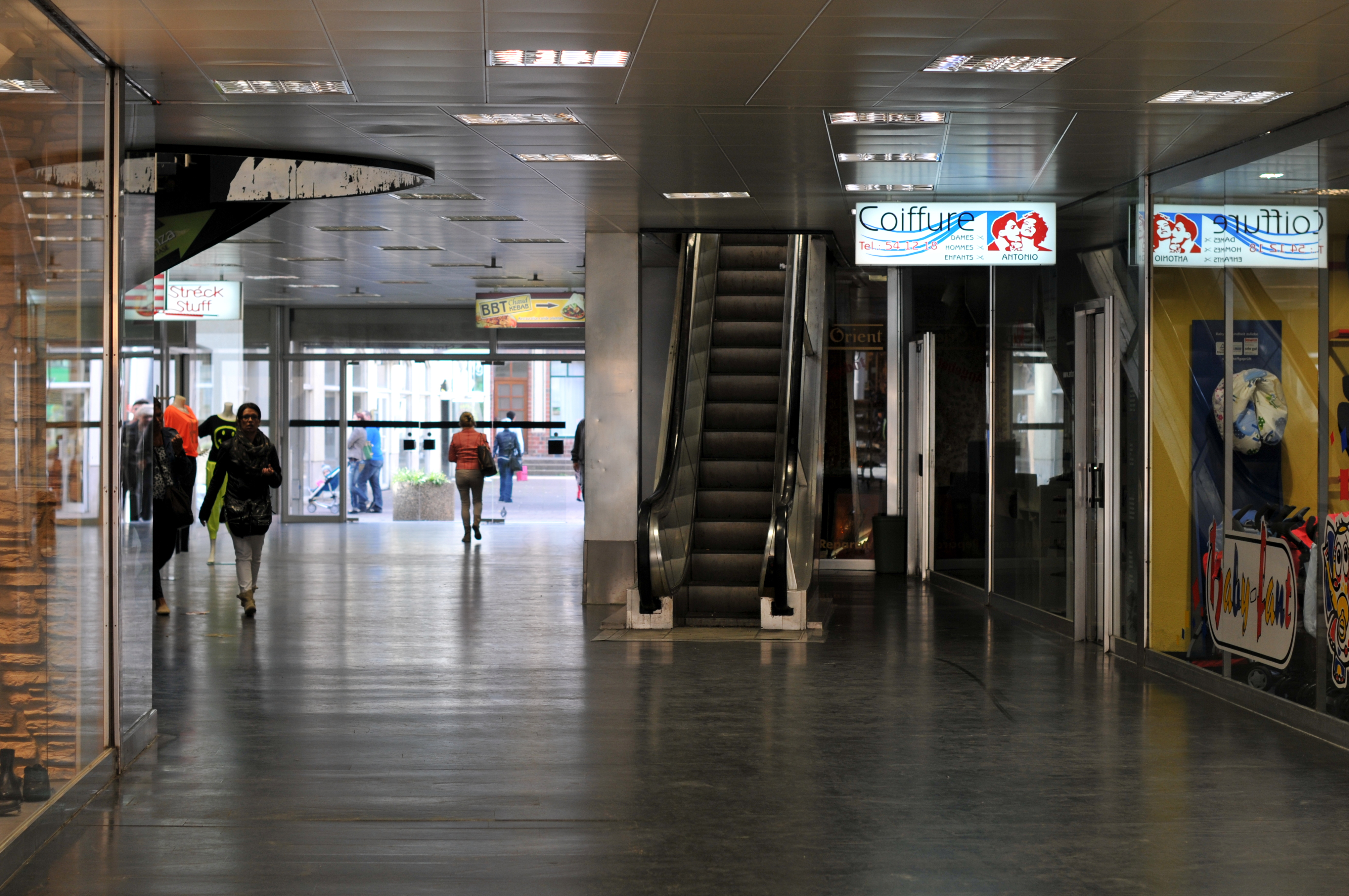 Am Centre Mercure an der Uelzechtstrooss Esch.